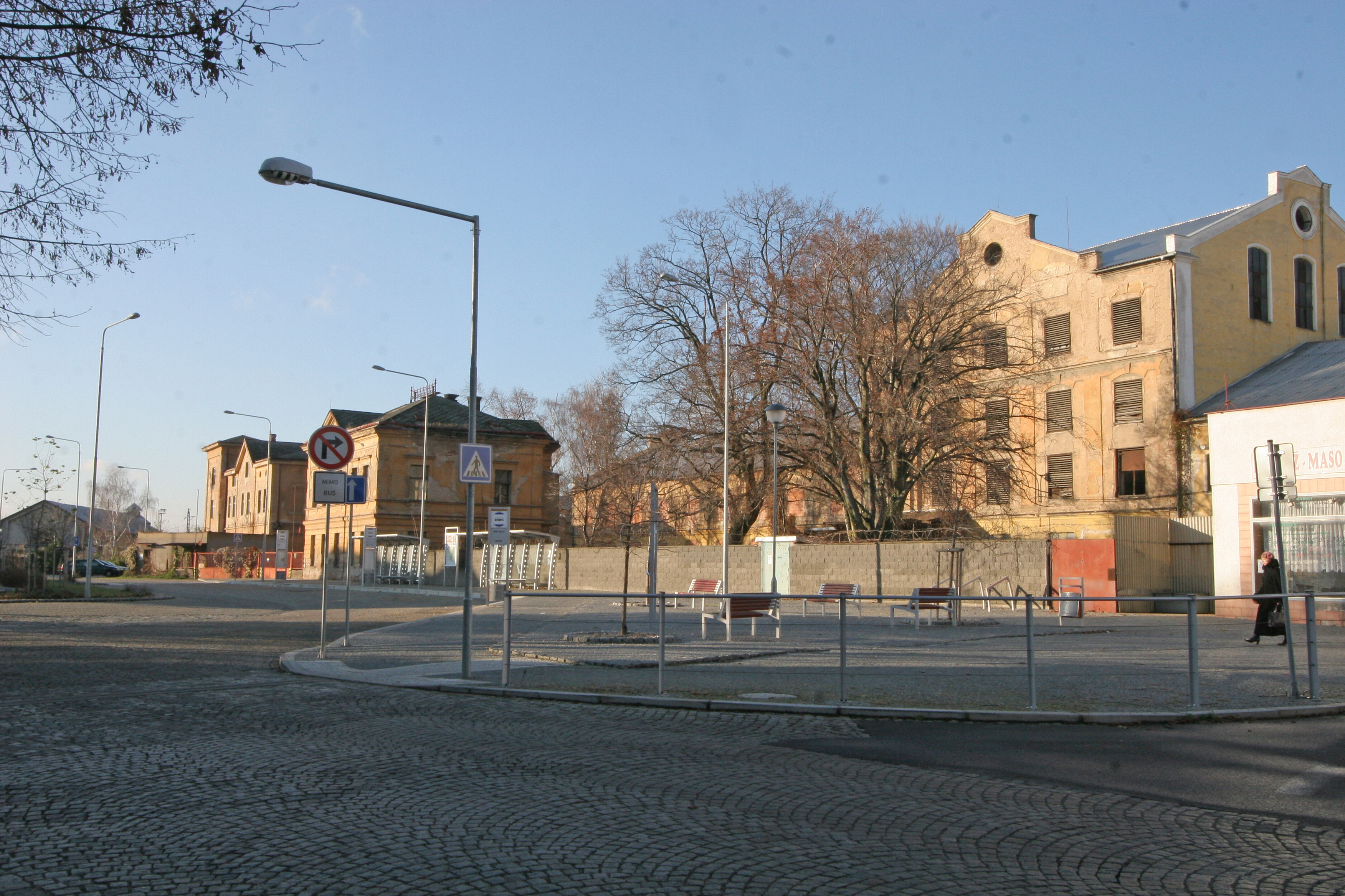 Pečky - průmyslový areál u nádraží